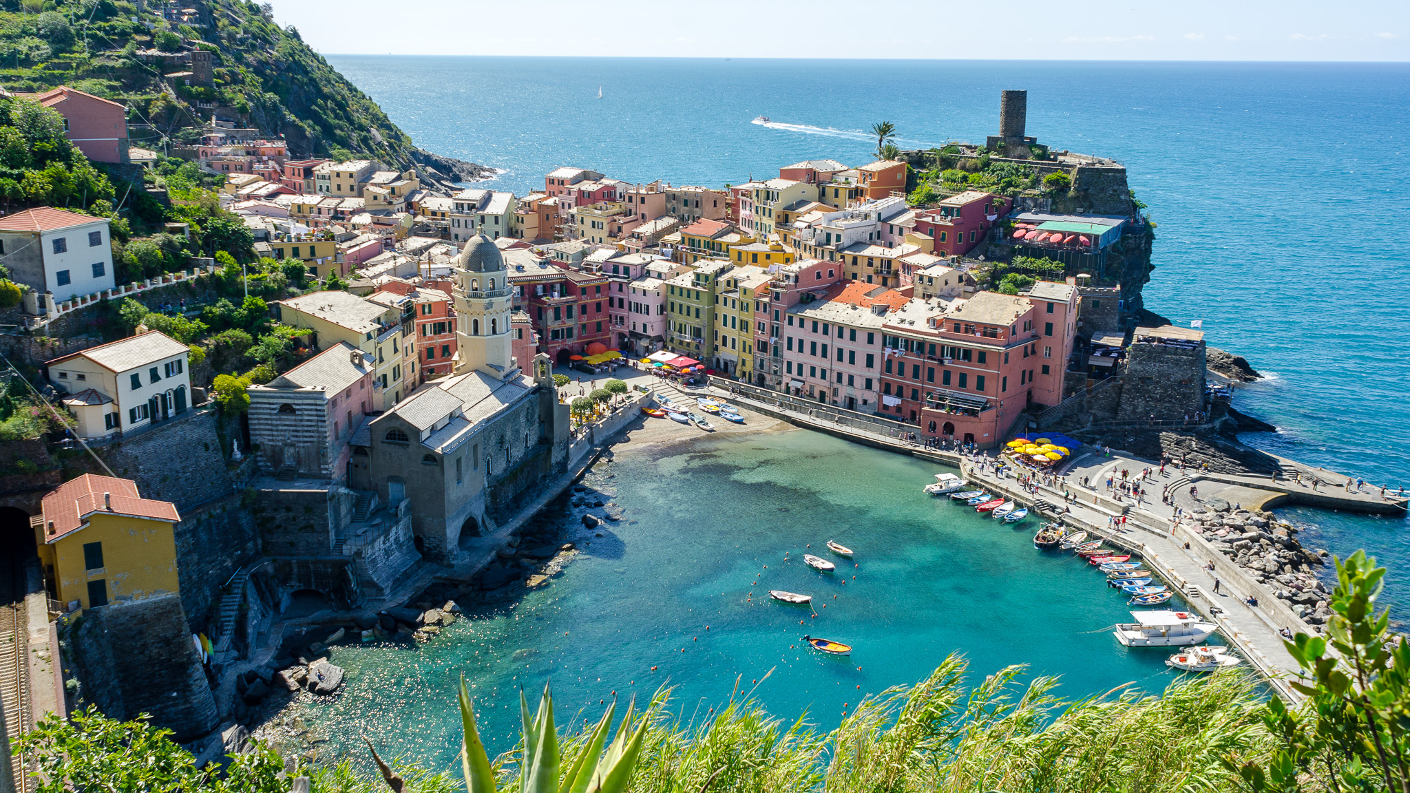 Vernazza, Cinque Terre, vista panoramica.